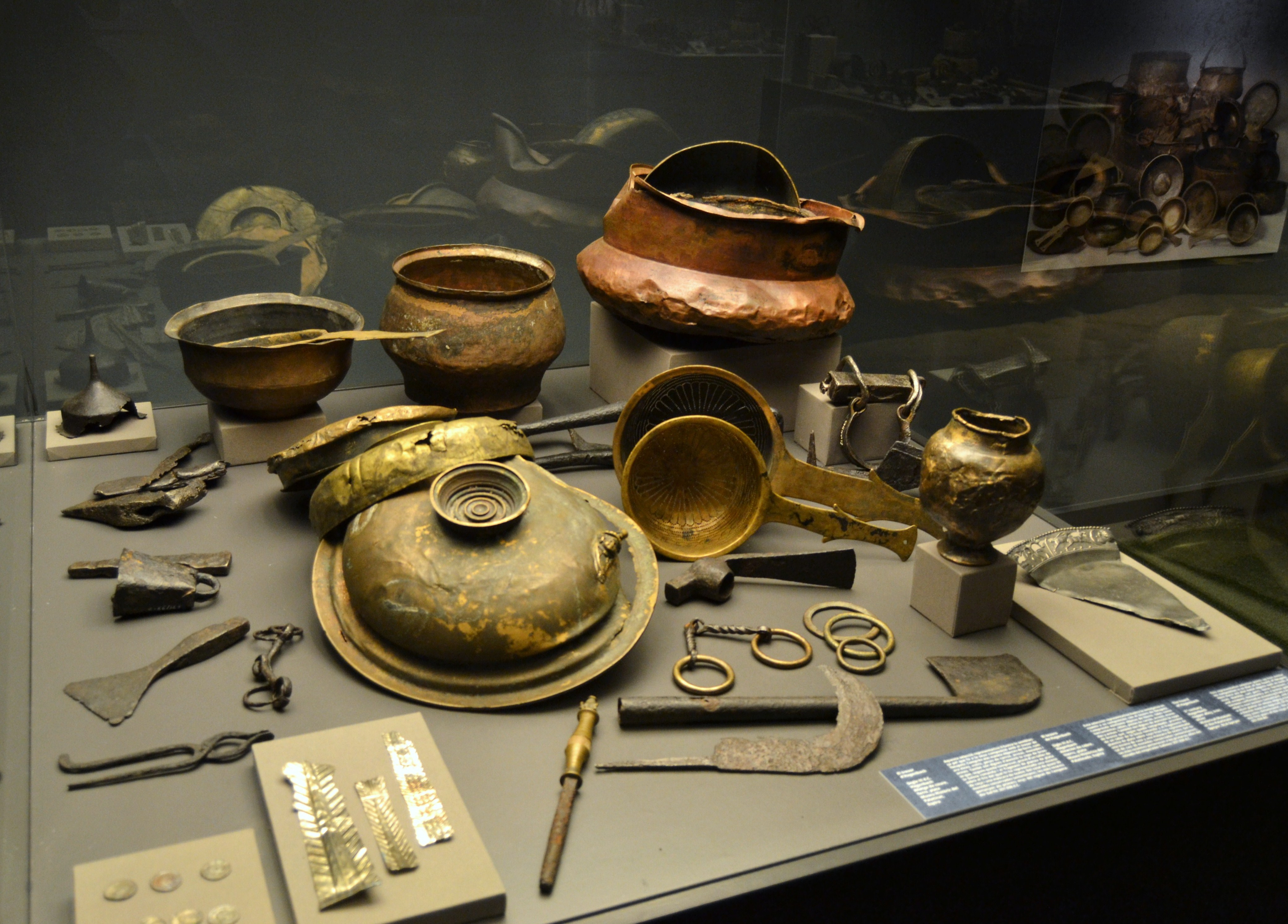 Tresor de Hagenbach, s. III dC, Museu Històric del Palatinat, Espira. Exposició El Tresor dels Bàrbars del Museu Arqueològic d'Alacant. El tresor consta d'objectes de ferro, com ara estris, peces de carro, arreus, monedes i armes. També són dignes d'atenció la copa de bronze, que segons queda comprovat, provés d'un taller de la Suïssa romanda i el fragment de planxa de plata sobre el fris del qual hi ha representada una escena de caça i una màscara de teatre. Del total de quasi 30 monedes conservades (antoninians), les més recents pertanyen als primers anys de l'emperador Gal·lié: 257 - 258 dC.